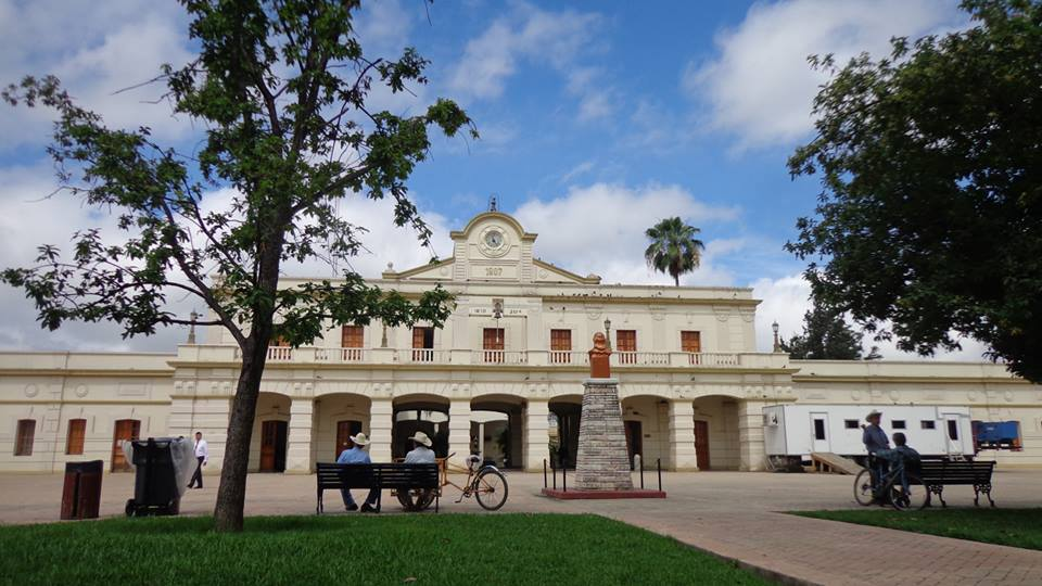 Palacio Municipal